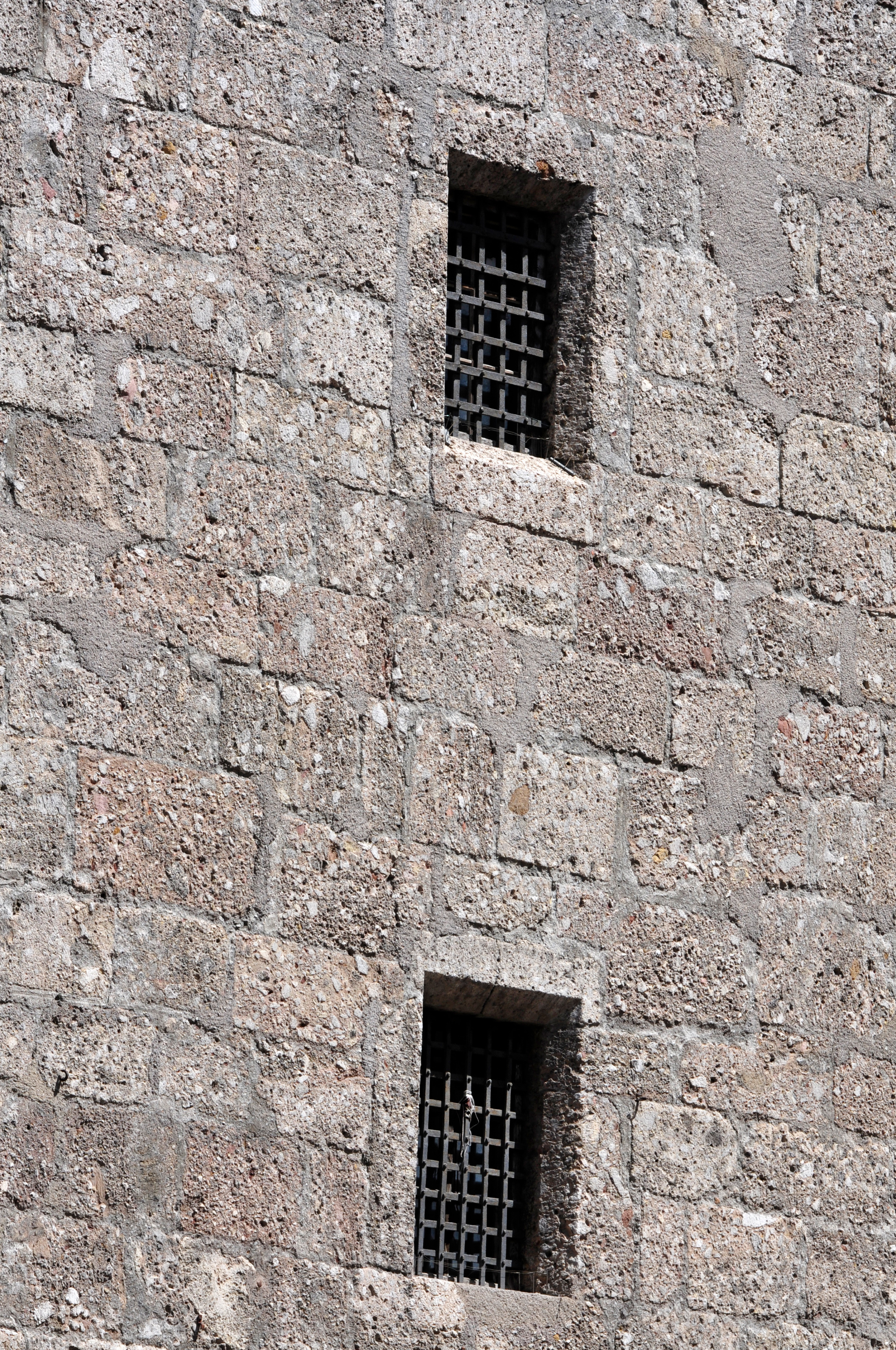 Innsbruck Im Rahmen des Fußballländerspiels Österreich gegen Rumänien bin ich einige Stunden durch Innsbruck gefahren und habe Aufnahmen gemacht, die vielleicht mal gebraucht werden könnten. --Ralf Roleček 11:20, 10 June 2012 (UTC) The making of this work was supported by Wikimedia Austria. For other files made with the support of Wikimedia Austria, please see the category Supported by Wikimedia Österreich.